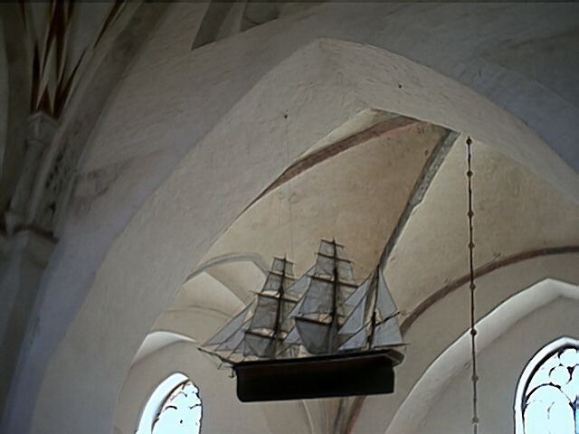 Sankt Petri kyrka, Ystad, votivskepp. Fotograf: Väsk.